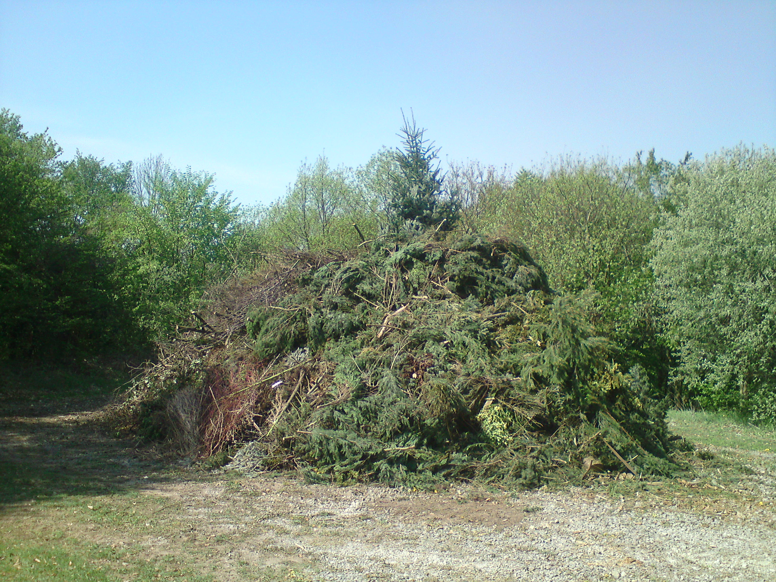 Derentaler Osterfeuer 2011